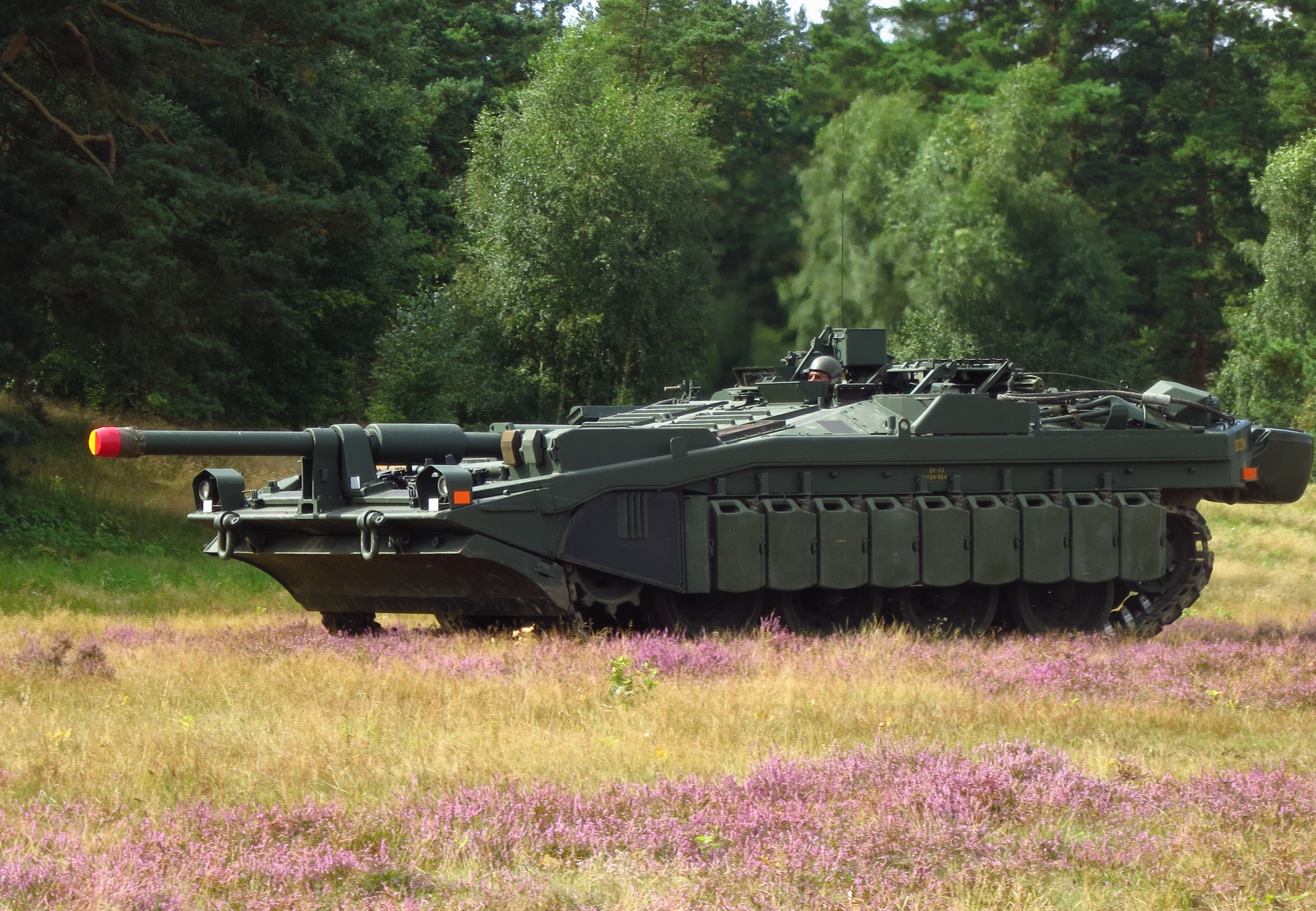 Stridsvagn 103 (Stridsvagn S) vid Regementets Dag på P7 Revingehed